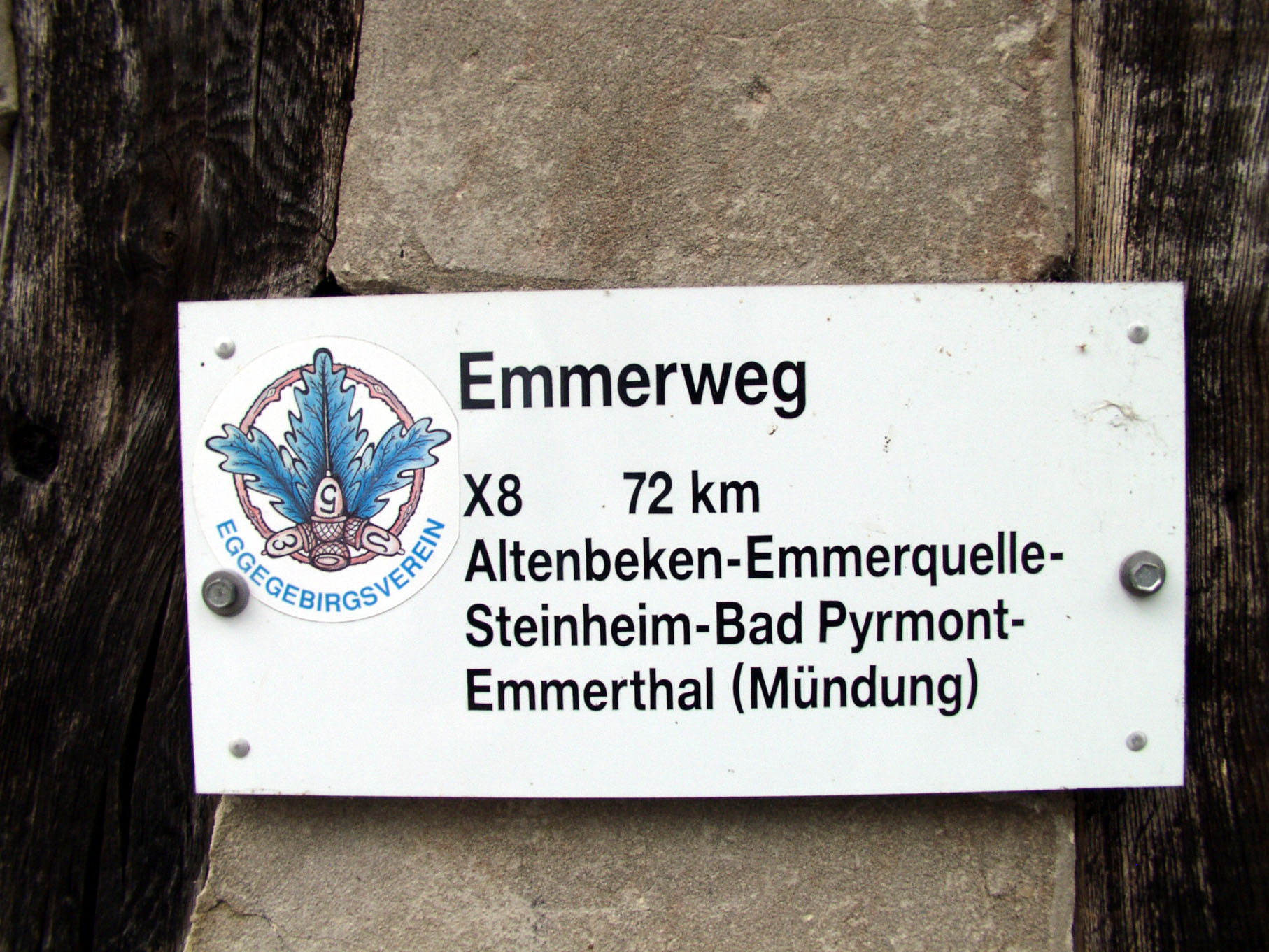 Wegweiser des Emmerwegs (X8) mit EGV-Aufkleber (Eggegebirgsverein)